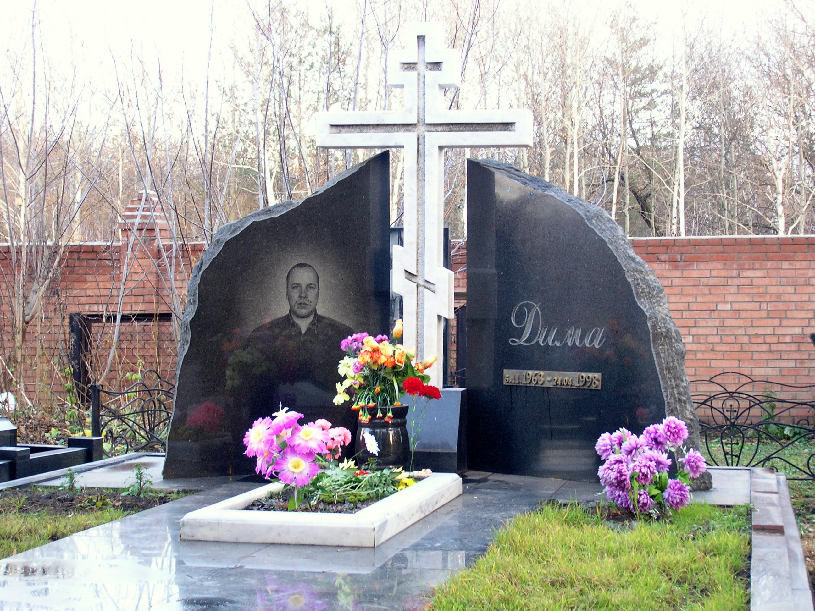 Могила Дмитрия Рузляева, одного из криминальных авторитетов Тольятти, убитого в 1998 году. Баныкинское кладбище, Тольятти, Россия